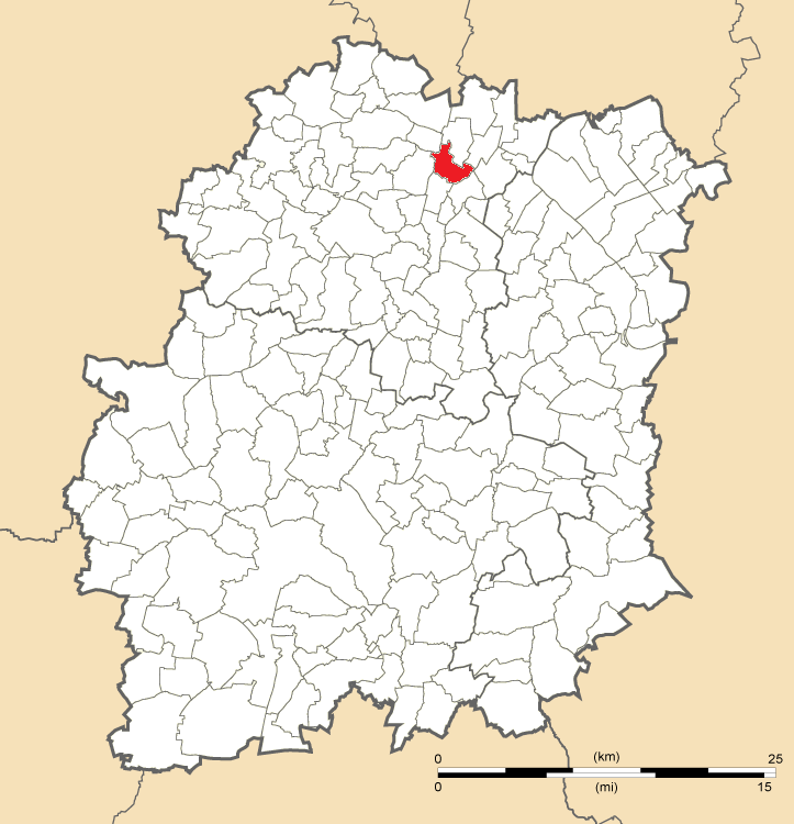 Carte de position de Longjumeau en Essonne